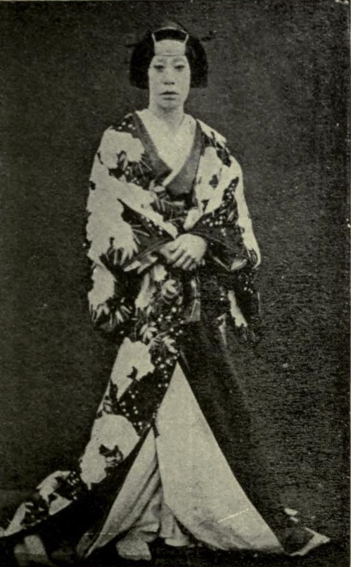 市川團十郎 (9代目)